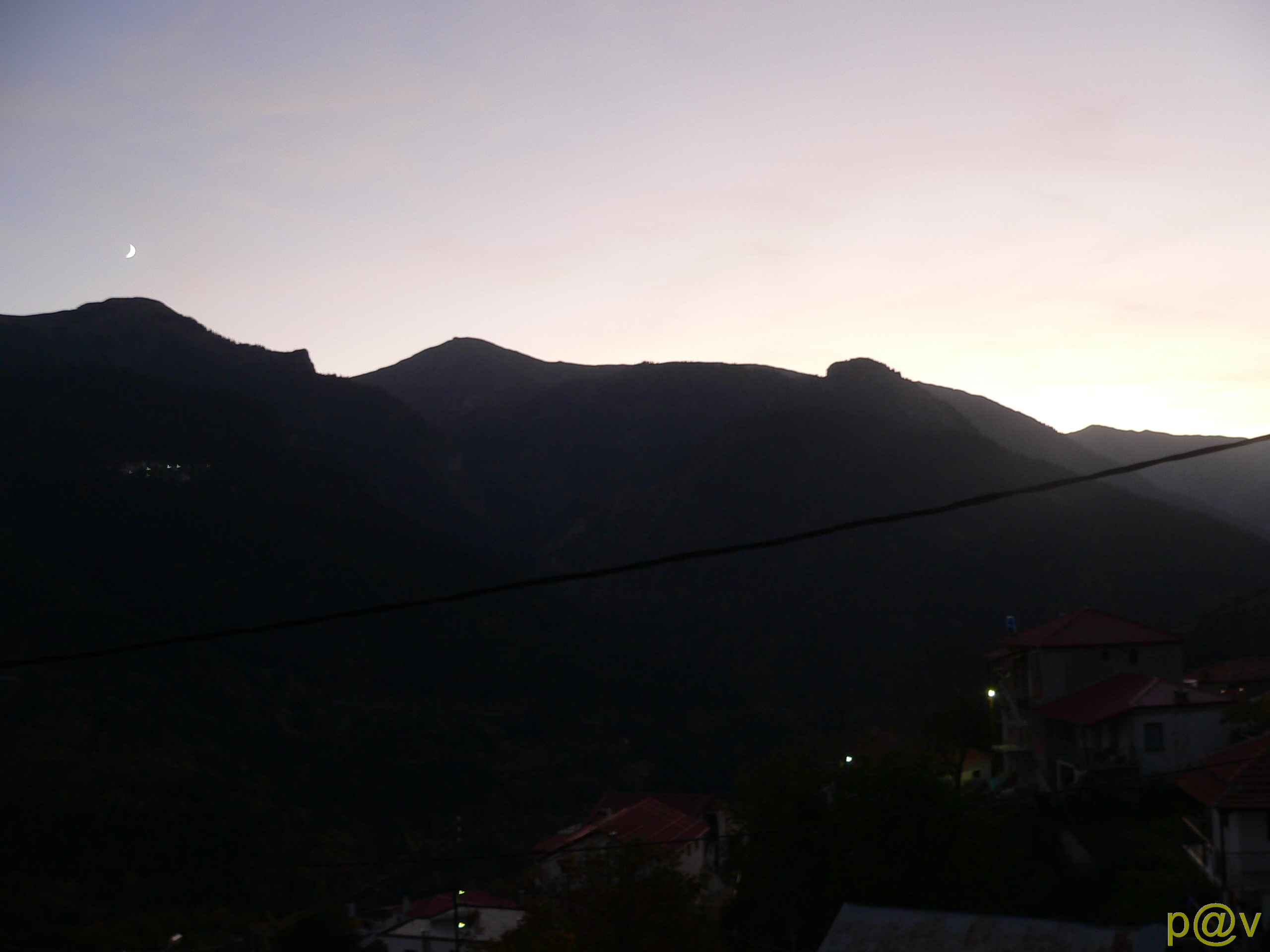 Η ωραια κοιμωμενη βραδυ